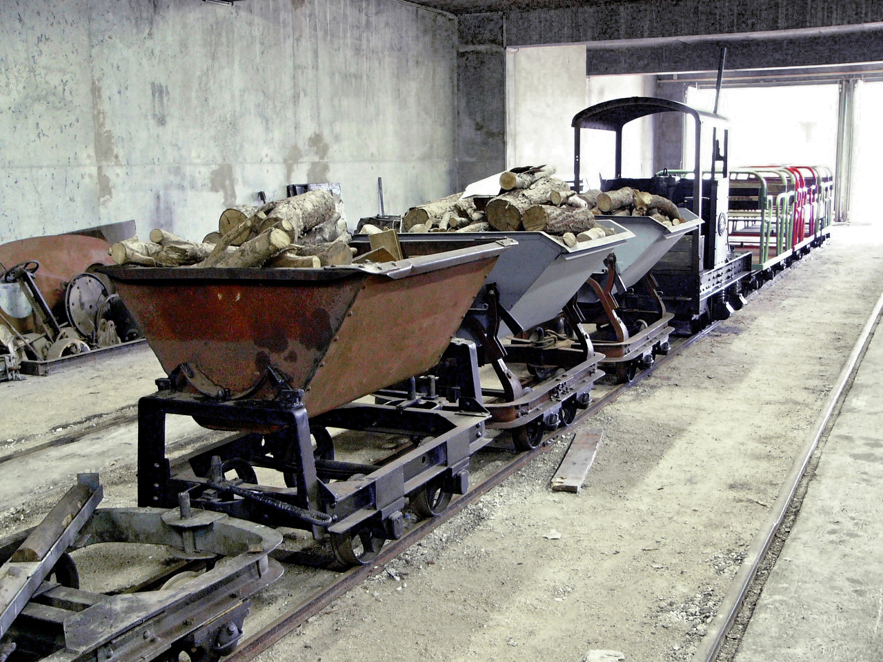 Tomberaux Decauville au Chemin de Fer des Chantereines